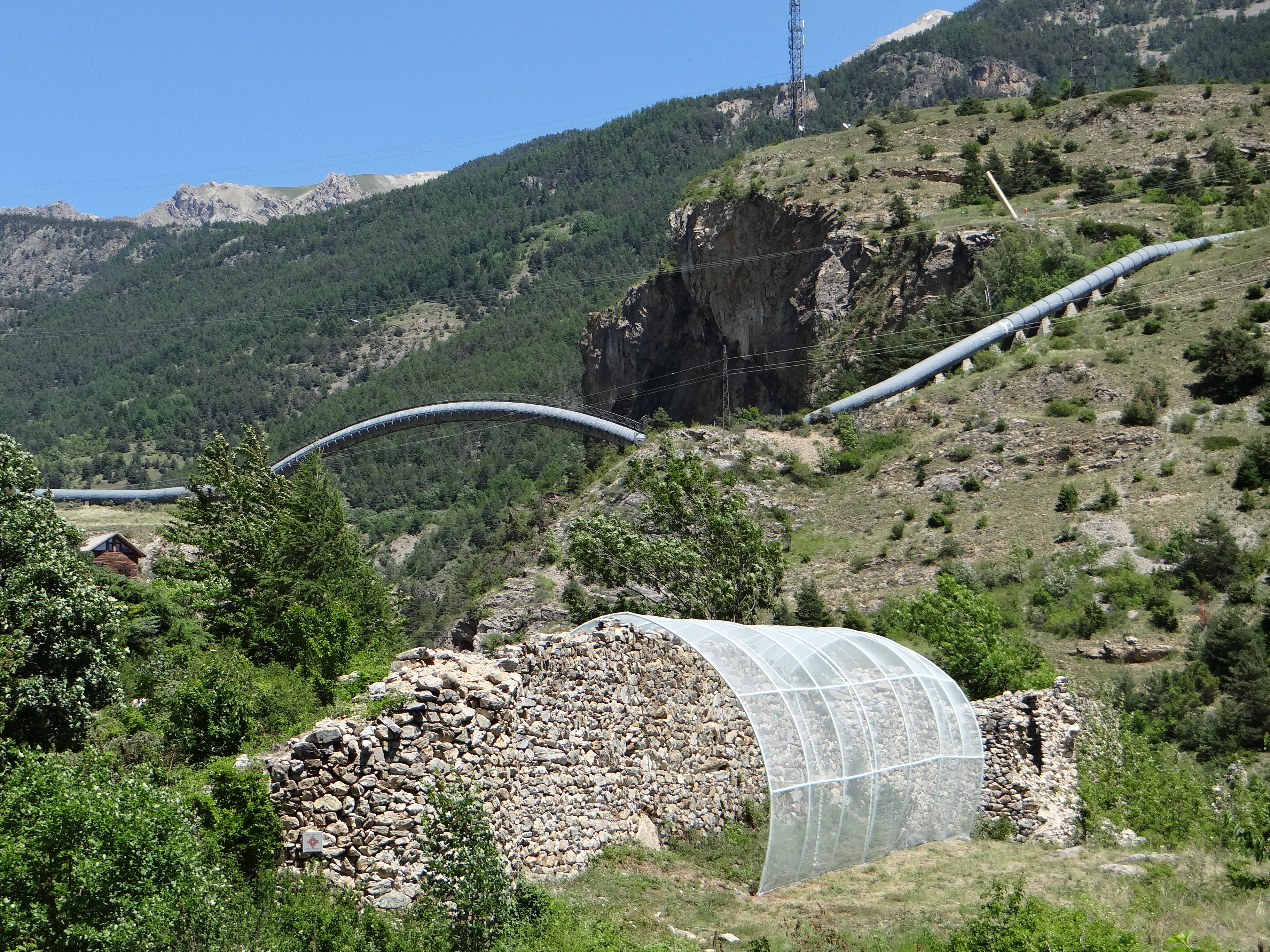 La Bâtie des Vigneaux : Mur des Vaudois de et siphon du Barry